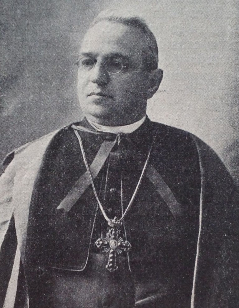 Josef Tumpach (1862-1916), český římskokatolický kněz a kanovník Metropolitní kapituly u sv. Víta v Praze